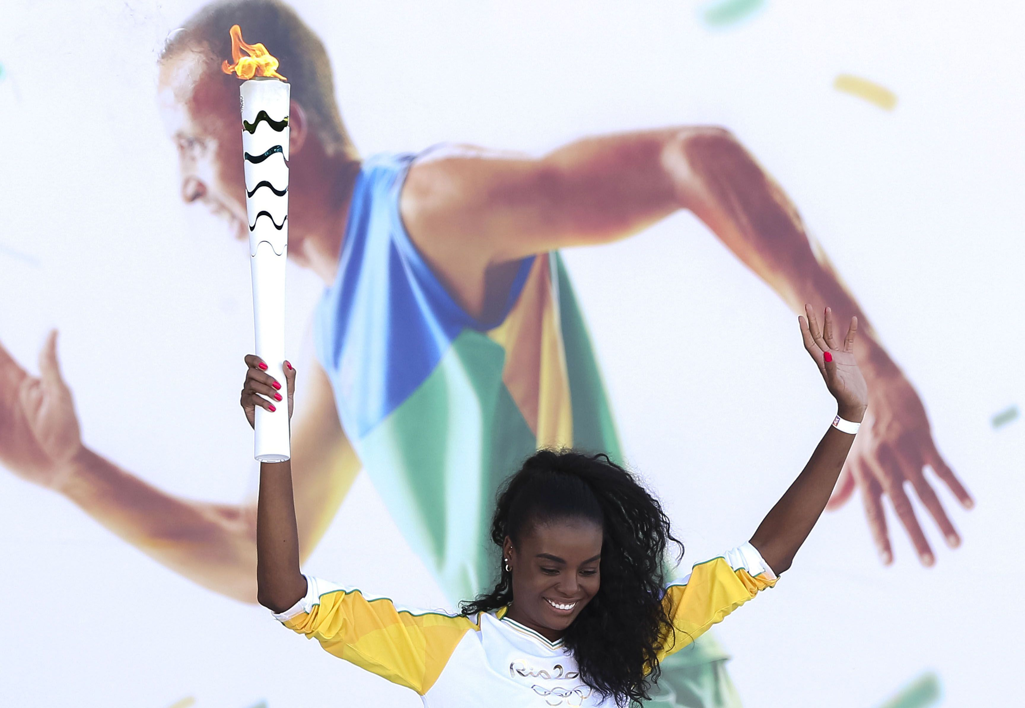 Brasília - A jogadora de vôlei Fabiana Claudino, bicampeã olímpica (2008 e 2012), recebe a Tocha Olímpica das mãos da presidenta Dilma e começa o revezamento na Capital